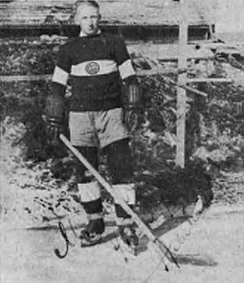 Michał Antuszewicz (przed 1937)